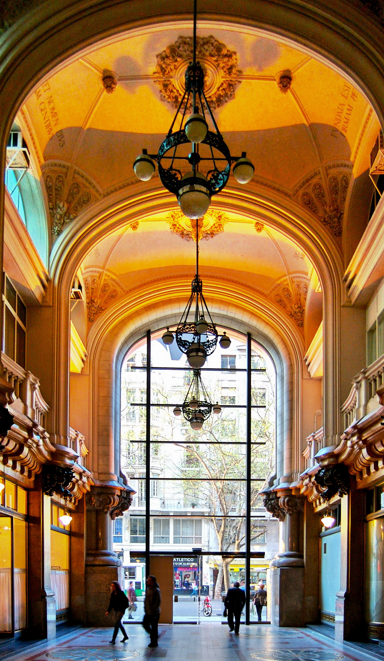 Hall principal del Palacio Barolo. Avenida de Mayo, Buenos Aires, Argentina